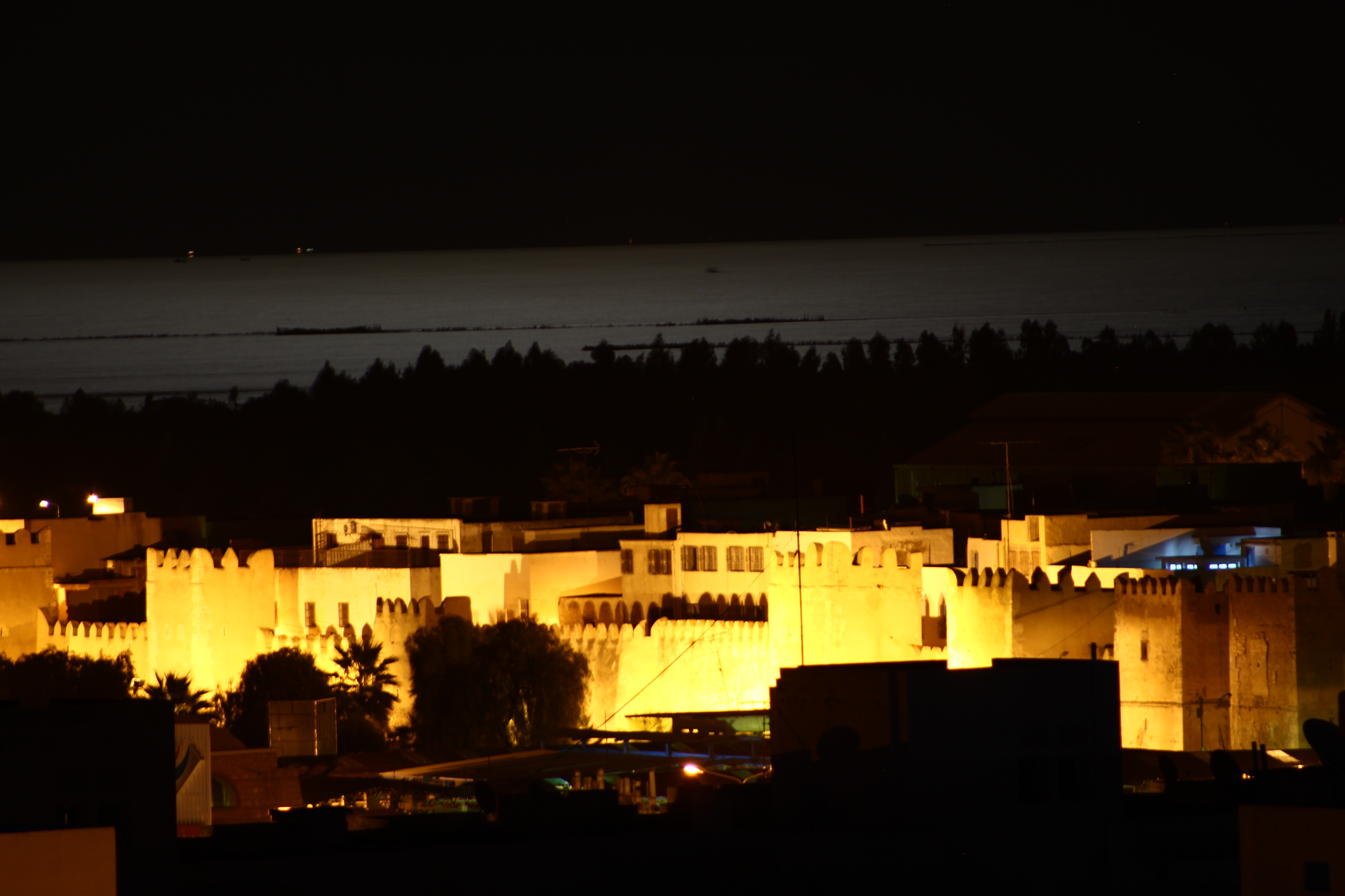 انعكاس الضّوء على جزء من أسوار مدينة صفاقس العتيقة ليلا